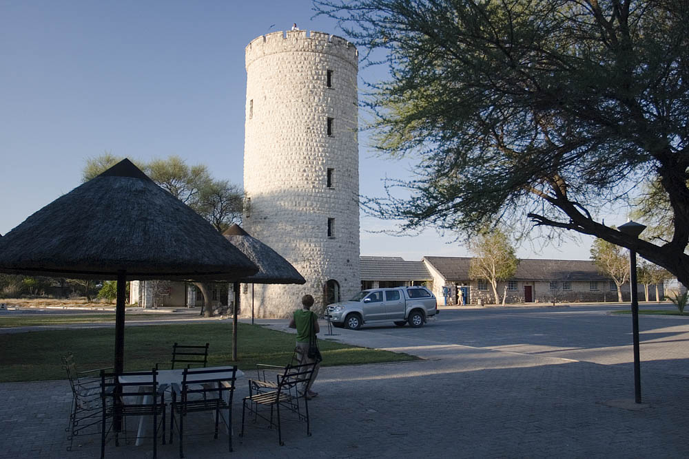 Tower at Okaukuejo, Namibia